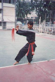 Một động tác trong bài Tứ linh đao